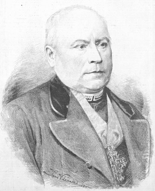 Josef Ehrenberger (1815 - 1882), spisovatel. Portrét, nakreslený Janem Vilímkem pro Humoristické listy